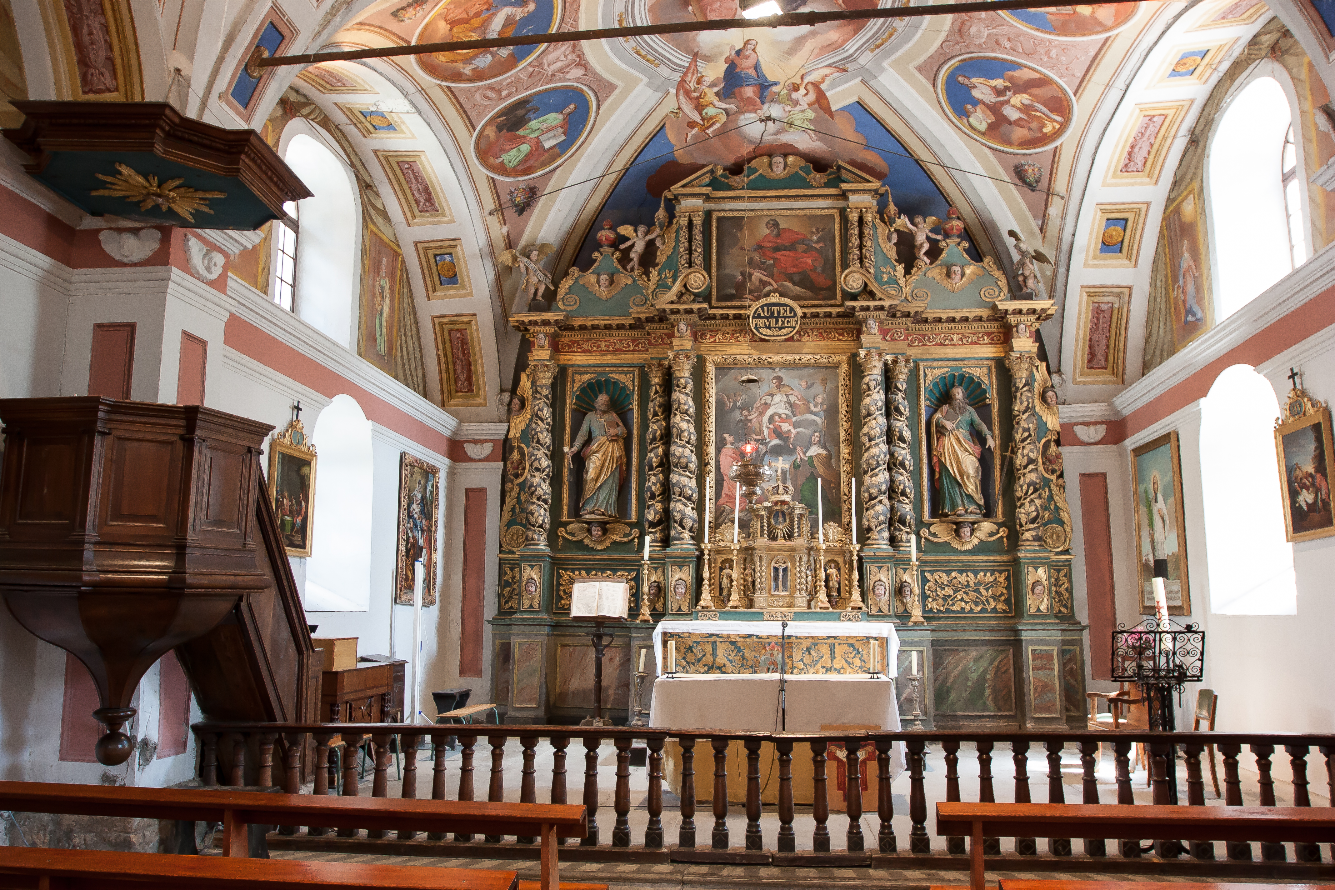 Intérieur de l'église Saint-Saturnin de Saint-Sorlin-d'Arves / Saint-Sorlin-d'Arves / Savoie / France